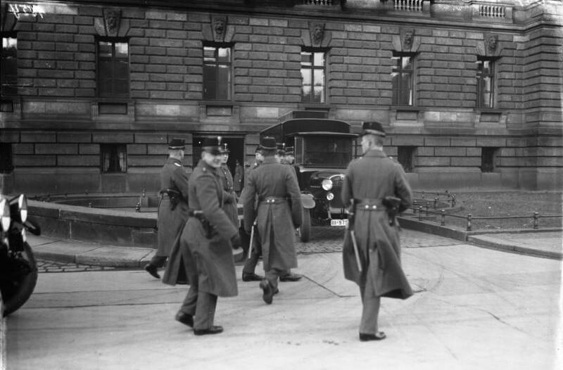 Leipzig. Der Prozess gegen die Tscheka vor dem Reichsgericht in Leipzig. Den Angeklagten ist zur Last gelegt, dass sie General v. Seeckt, Herrn v. Borsig und Hugo Stinnes aus dem Leben schaffen wollten. Das Hereinbringen des Autos mit den Angeklagten der Tscheka unter schwer militärischer Bedeckung in das Reichsgericht.